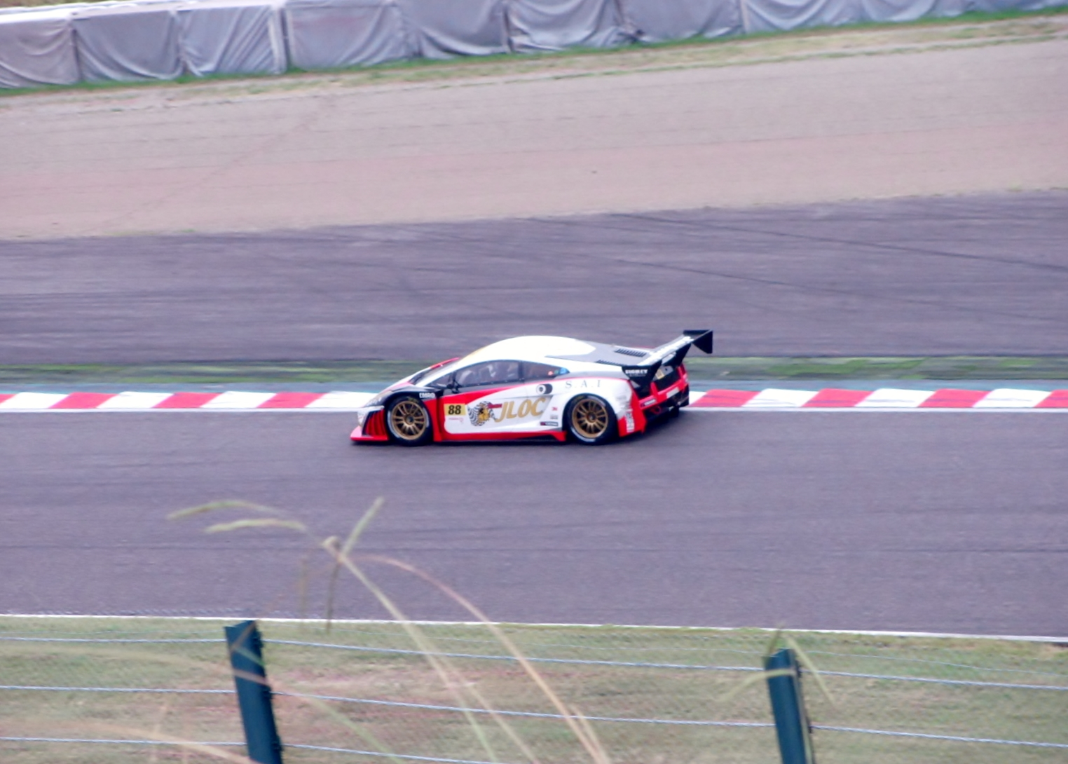 2011年度ポッカGTサマースペシャルにおける88号車JLOCランボルギーニRG-3を撮影。